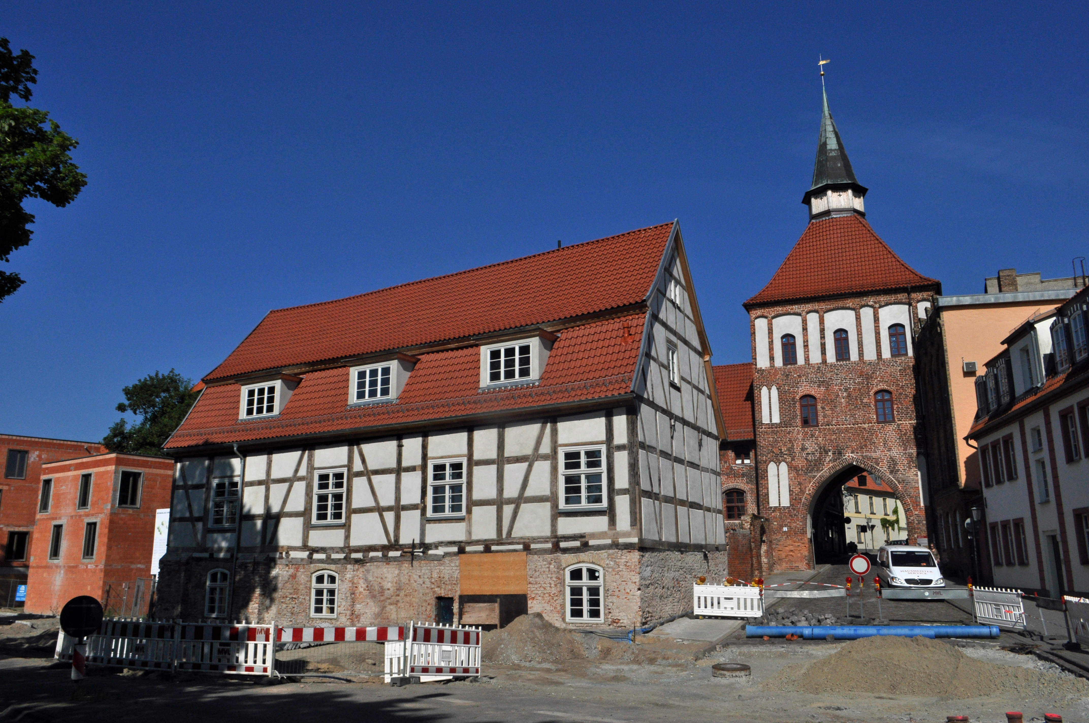 Gebäude am Knieperwall bzw. Am Kütertor in Stralsund.